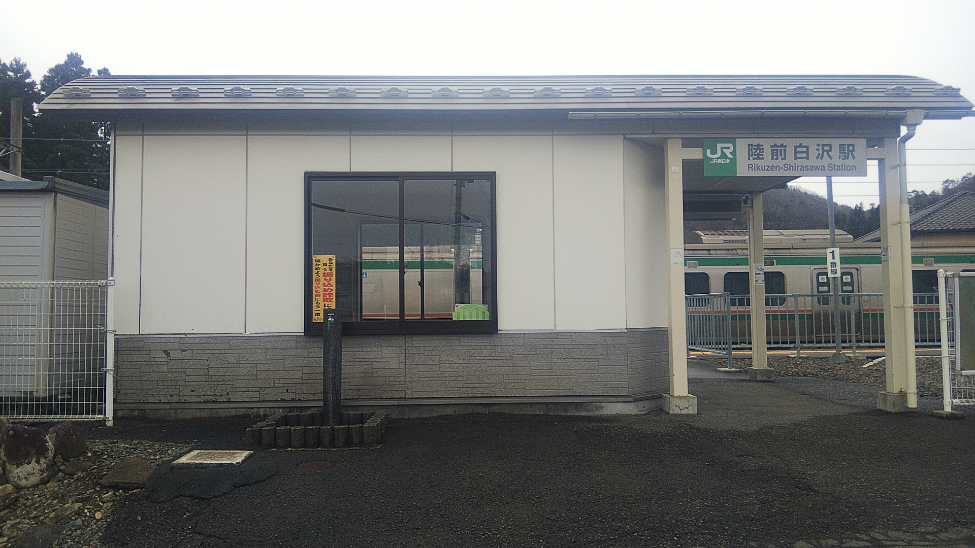 陸前白沢駅駅舎